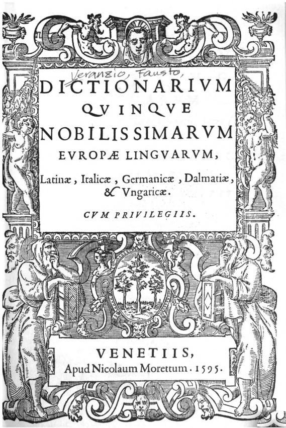 Fausto Veranzio's "Dictionarium quinque nobilissimarum Europæ linguarum, Latinæ, Italicæ, Germanicæ, Dalmatiæ, & Vulgaricæ", Apud Nicolaum Morettum, 1595, Venezia